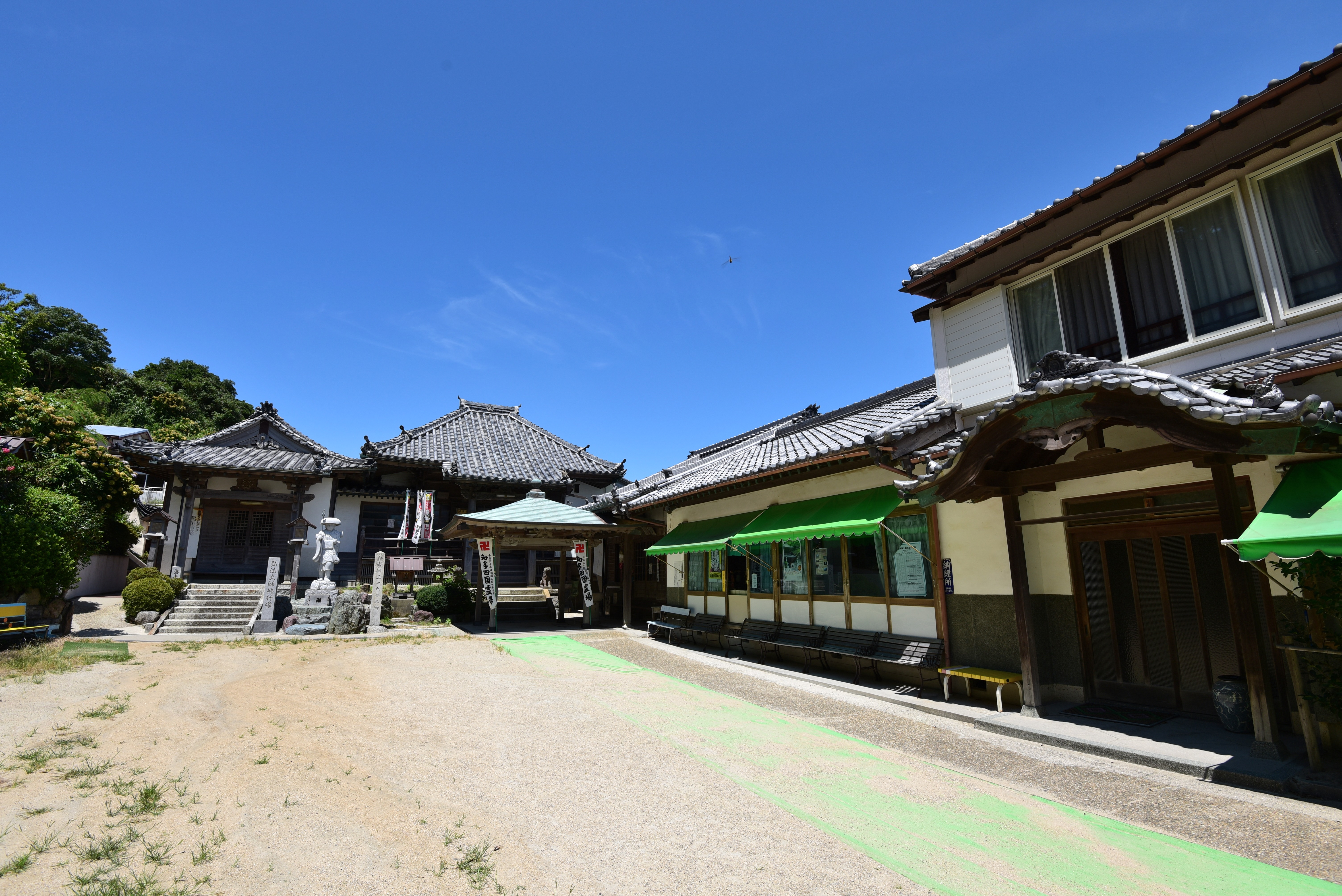 医徳院の本堂は、島内最古の木造建築物。